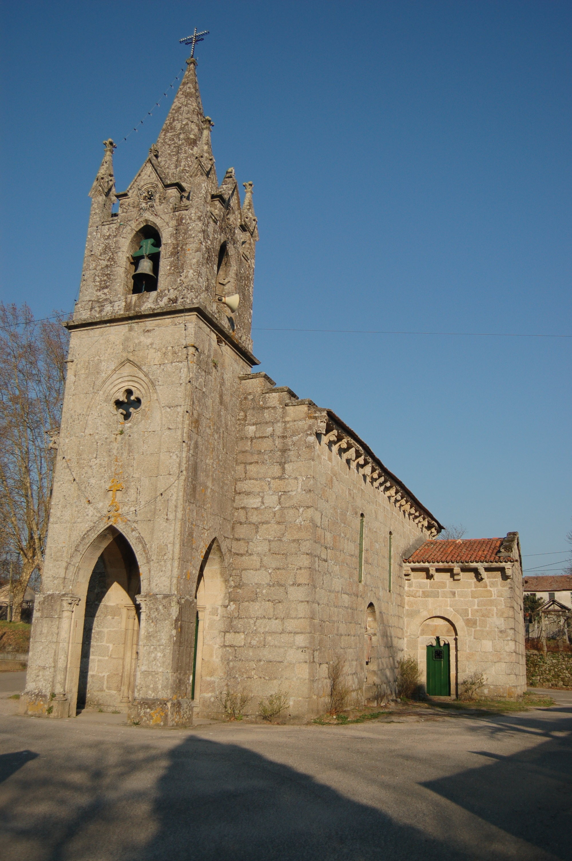 Igrexa parroquial de Angoares, Ponteareas